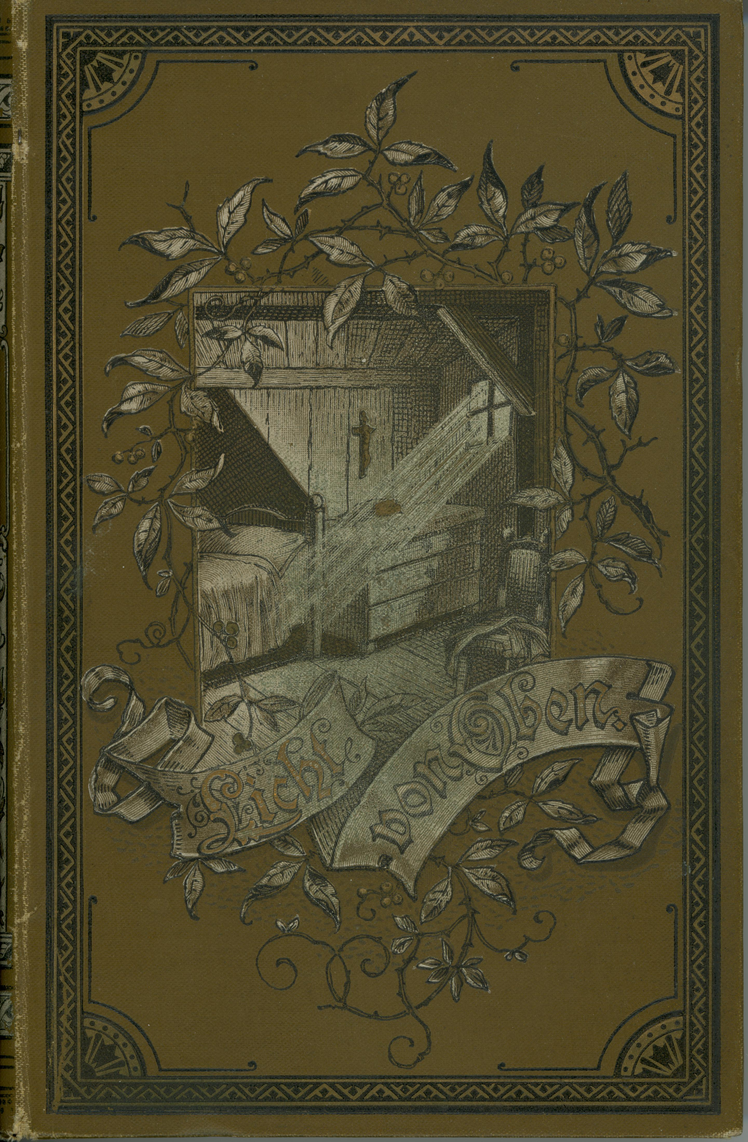 Vorderer Buchdeckel, C. Jacobshagen: Licht von Oben, 12. Aufl., 1892